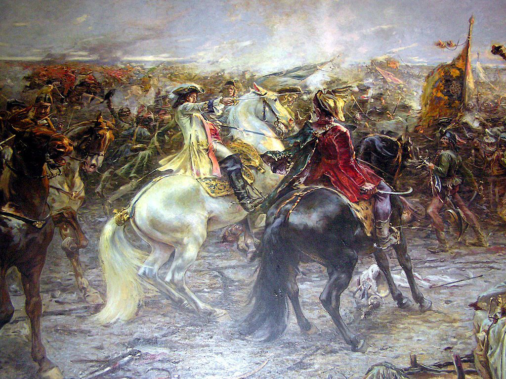 Die Schlacht bei Zenta (Fragment)